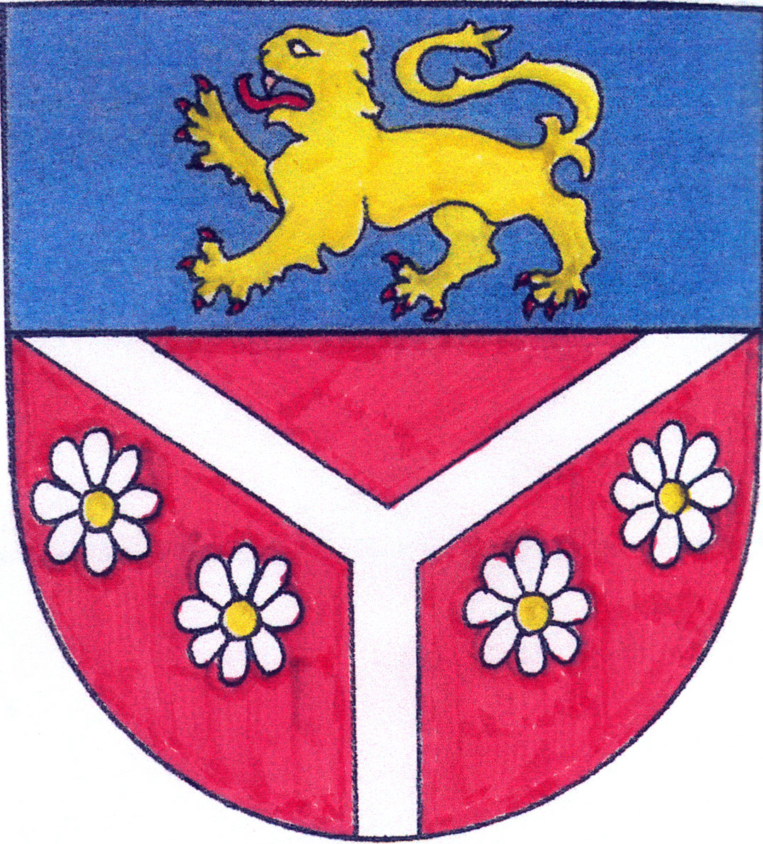 Znak obce Heřmanice (okres Náchod)